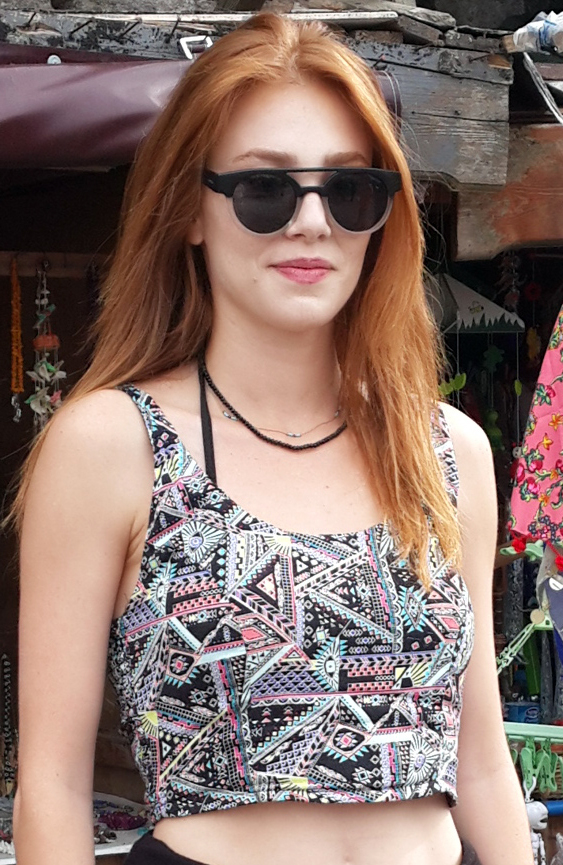 Elçin Sangu Eylül 2015